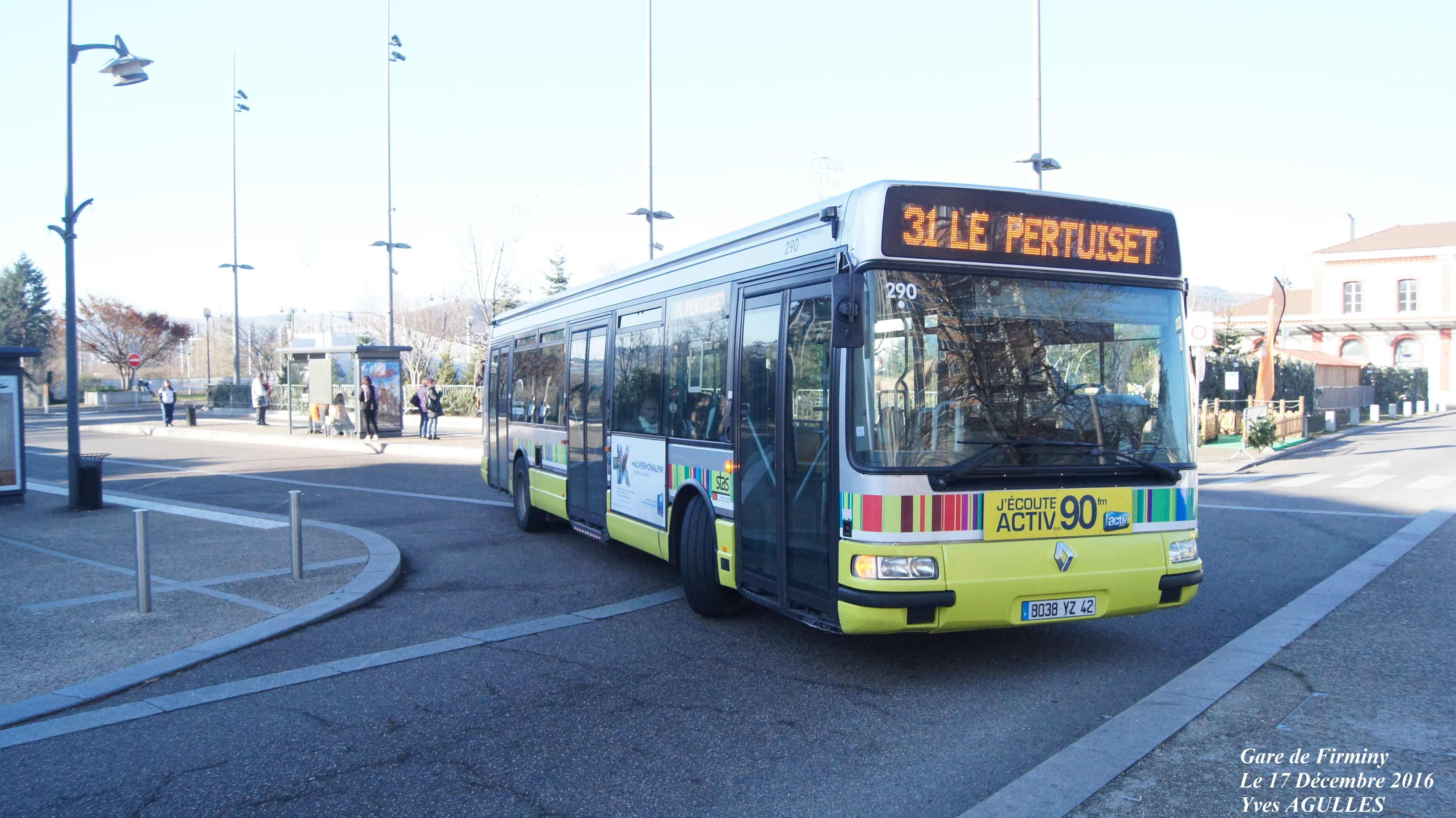 Renault Agora s Euro 3